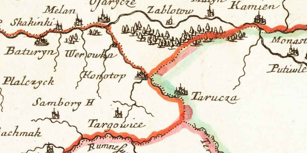 Отрывок из карты «Basse Volhynie, ou Palatinat De Kiow, tiré entierement de la grade Ukraine» Николя Сансона 1665 года, изображающий город Конотоп и близлежащие поселения.